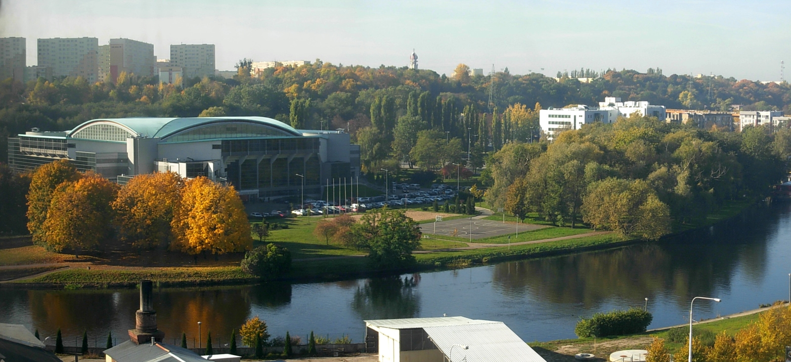 Hala widowiskowo-sportowa Łuczniczka w Bydgoszczy